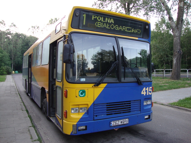 Volvo B10M-60 w taborze KM Szczecinek na pętli PILSKA(WIERZBOWA)